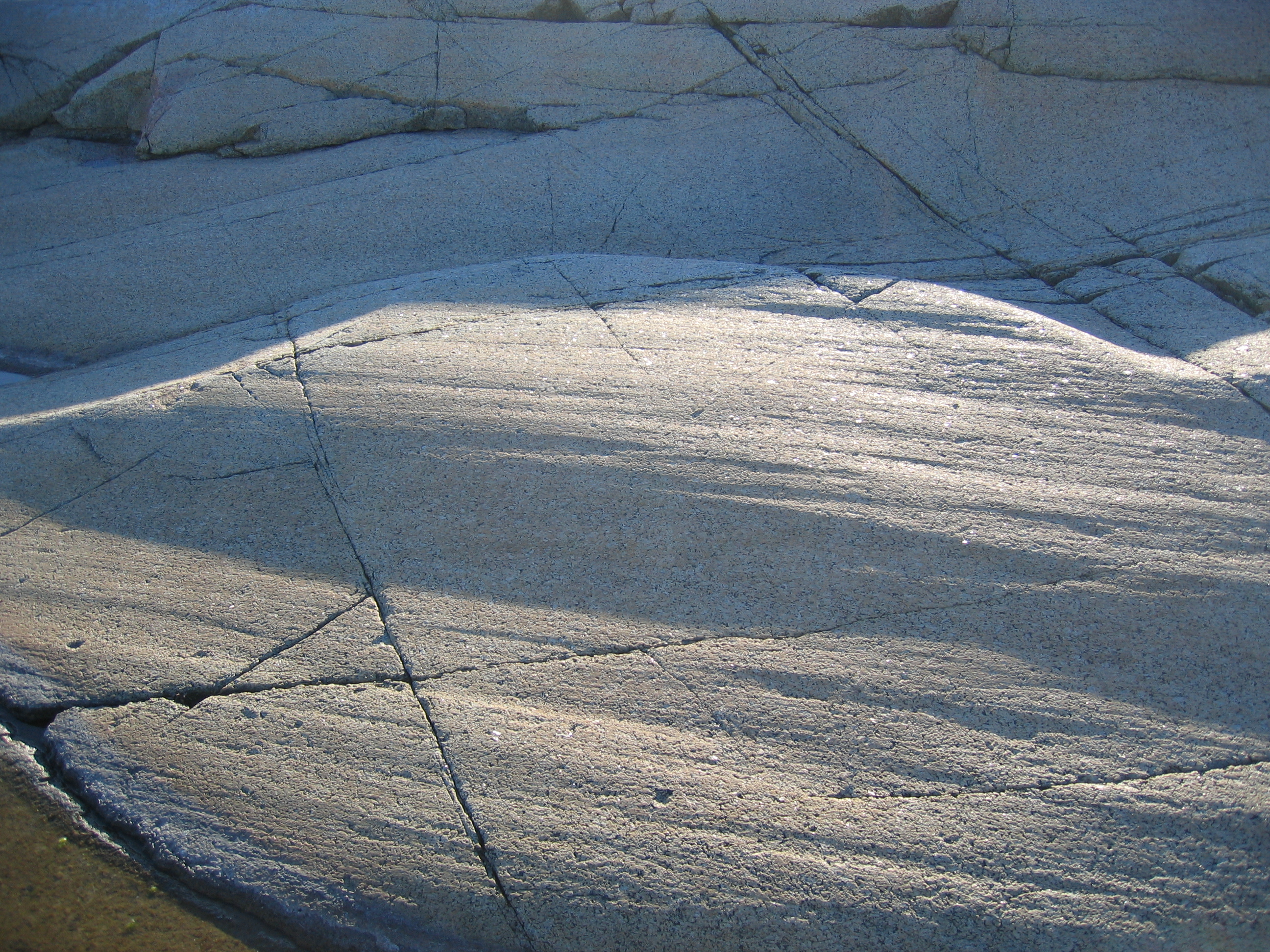 Tjøme, Moutmarka, skuringsstriper Author:Karl Ragnar Gjertsen